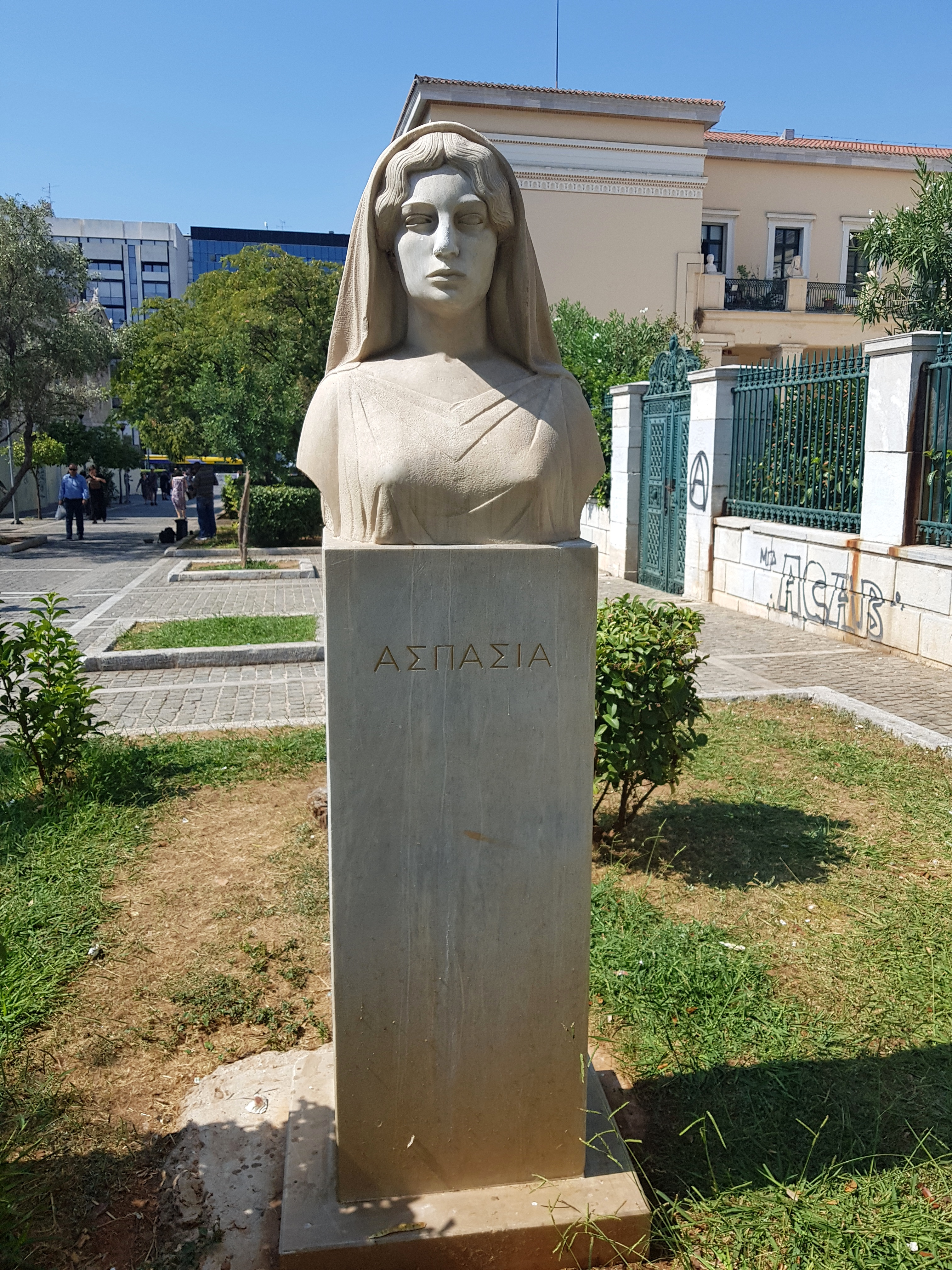 Εθνικό και Καποδιστριακό Πανεπιστήμιο Αθηνών«Κτίριο Εθνικού και Καποδιστριακού Πανεπιστημίου Αθηνών»